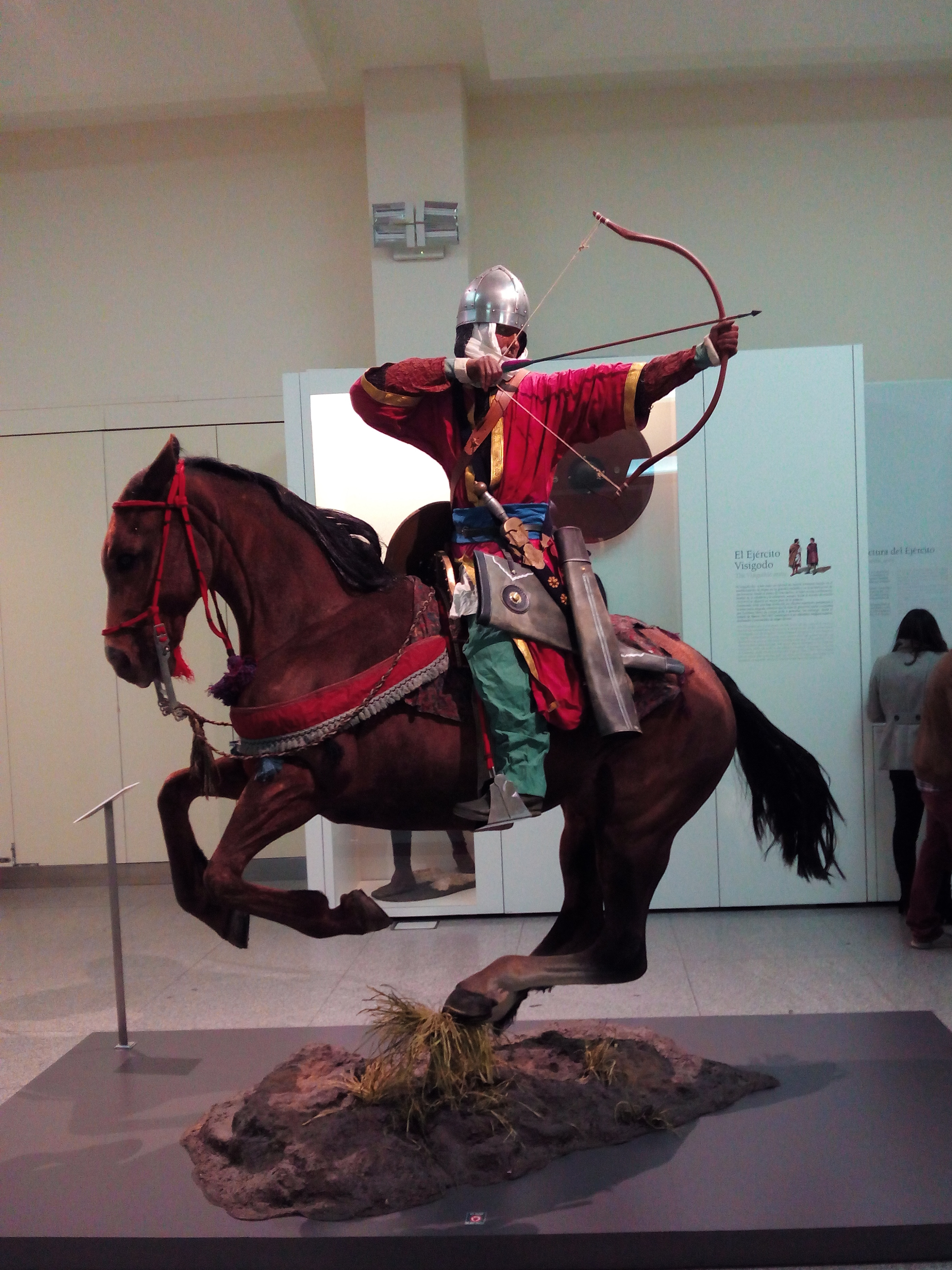 Museo del Ejército, Toledo (España).